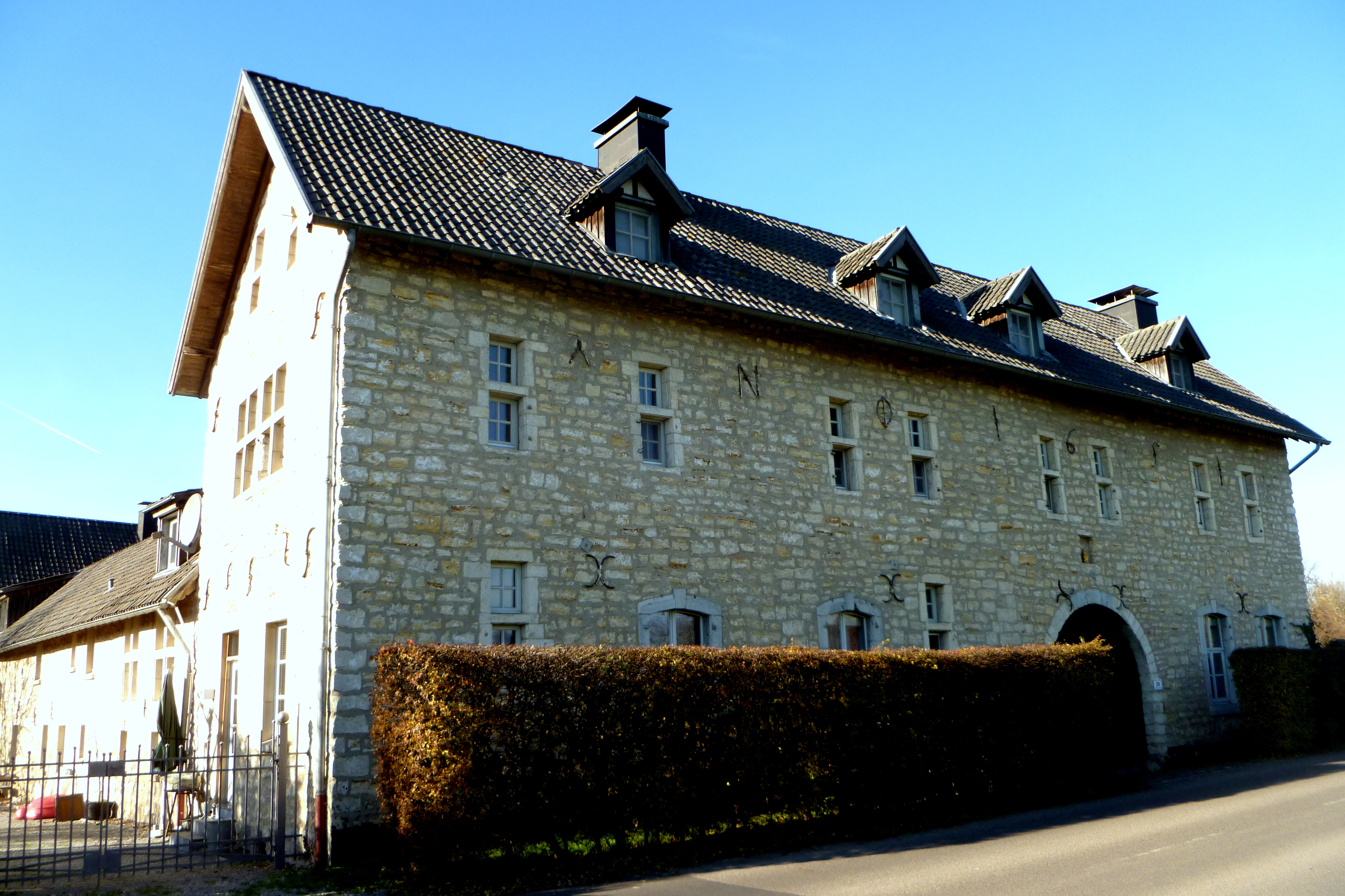 Baudenkmal in Aachen-Laurensberg